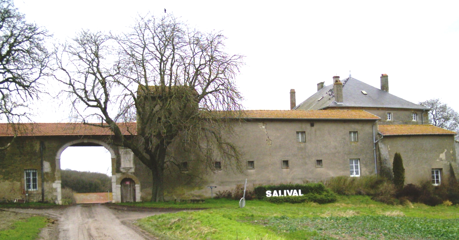 Facade de la ferme de Salival à Moyenvic